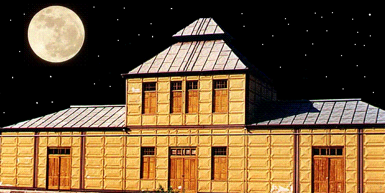 Railway Station Bananal - Estación de Ferrocarril de Bananal - Estação Ferroviária de Bananal